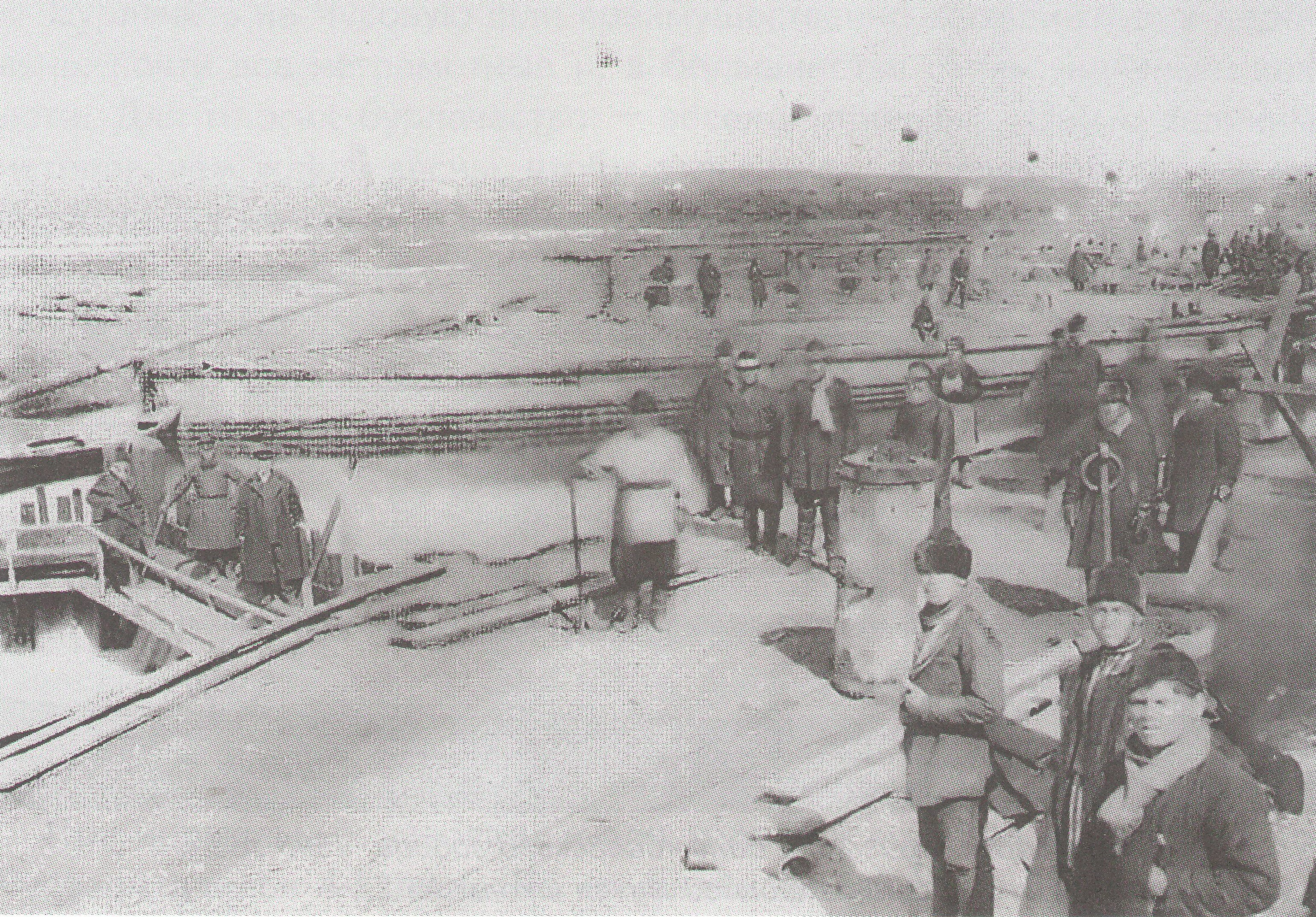 Билимбаевская пристань, 1910-е года